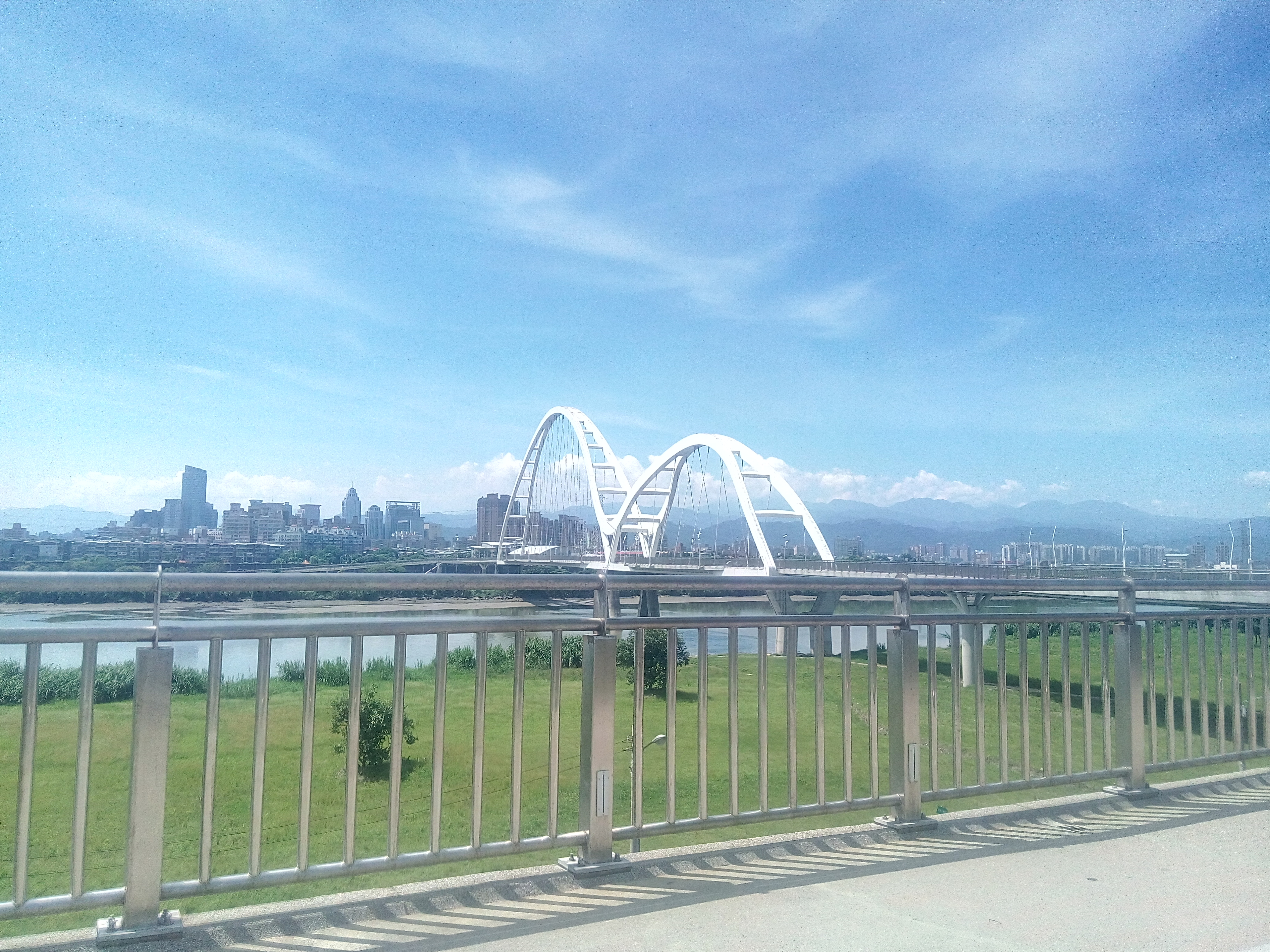 自新莊自行車道拍攝。